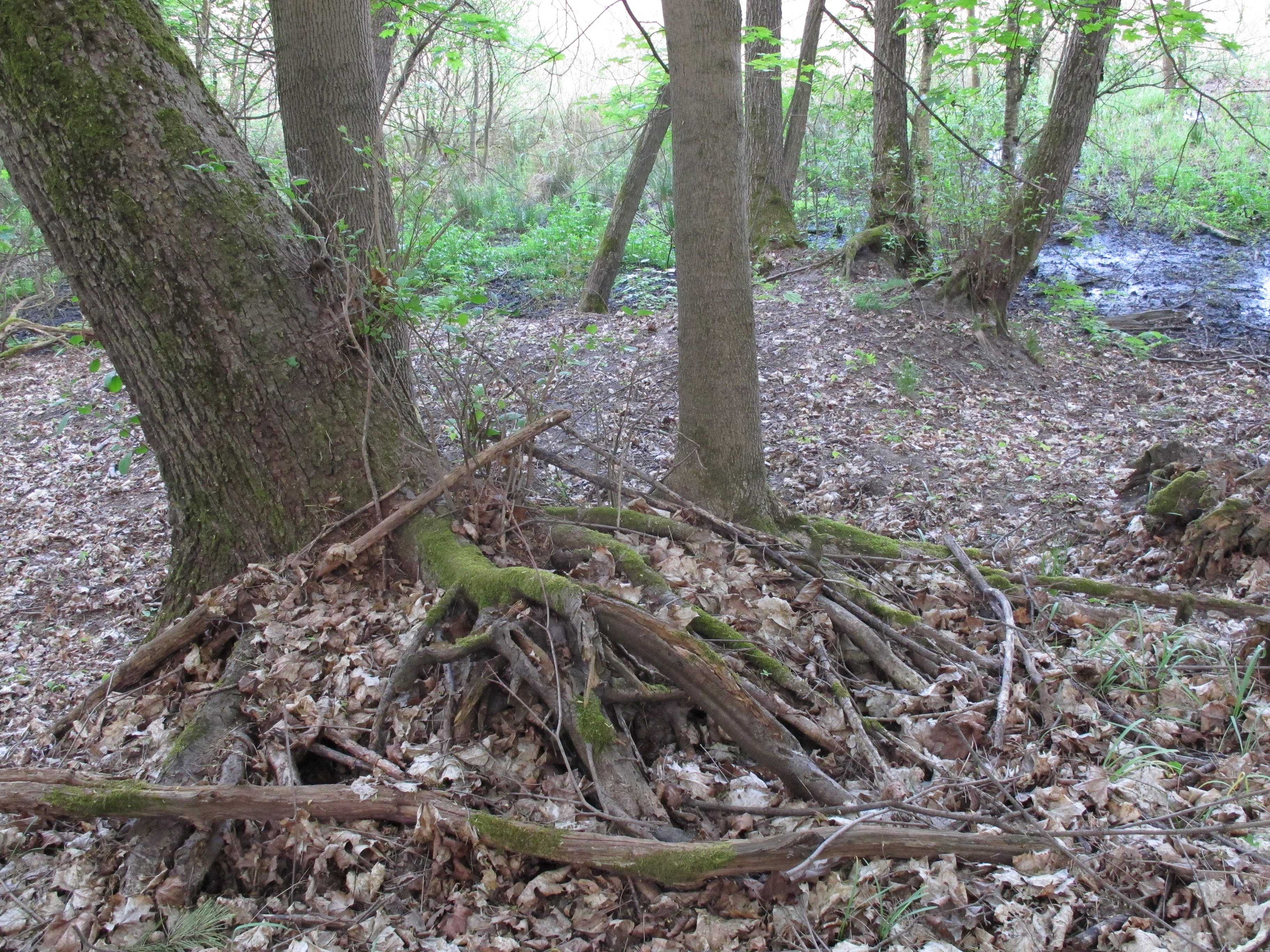 Naturschutzgebiet Barssee und Pechsee, Restbestände des Sees sind kaum sichtbar.